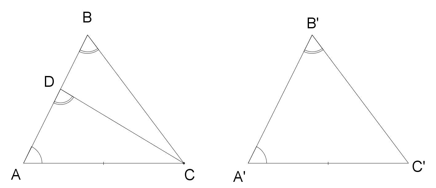 Imagem suporte para demonstração.